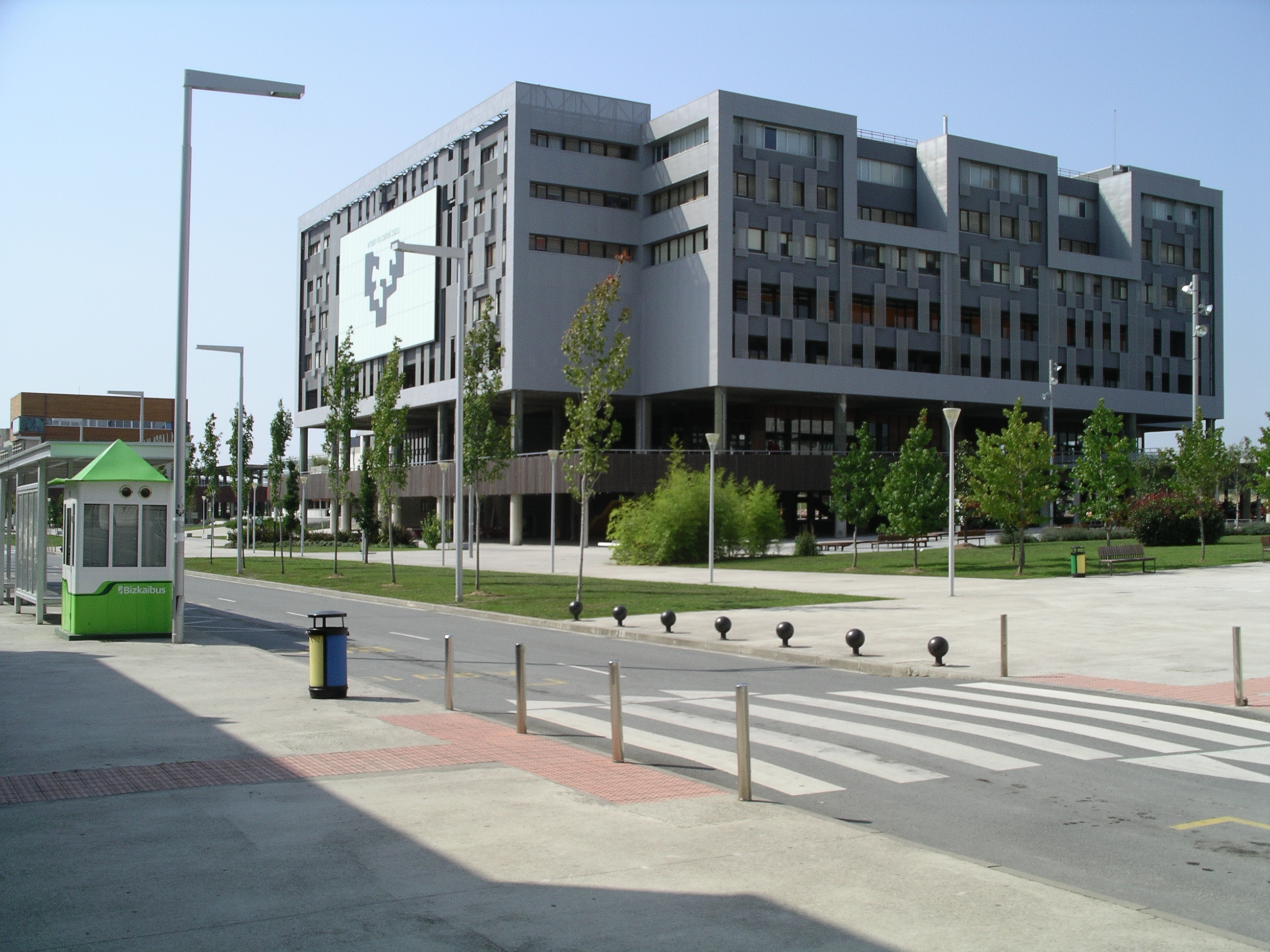 Euskal Herriko Unibertsitateko liburutegia eraikina, Bizkaiko Campusa, Leioa-Erandio, Euskal Herriko Unibertsitatea.